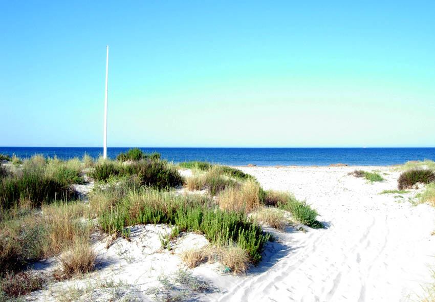 playa de punta de algas